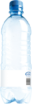 amo a karen